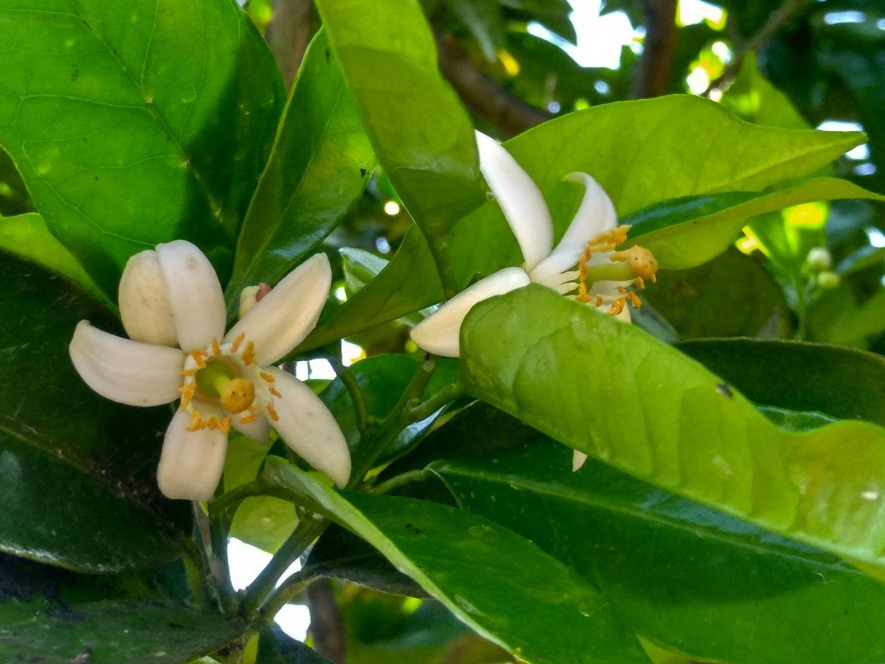 Zagara di arancio fiorita nel mese di aprile.